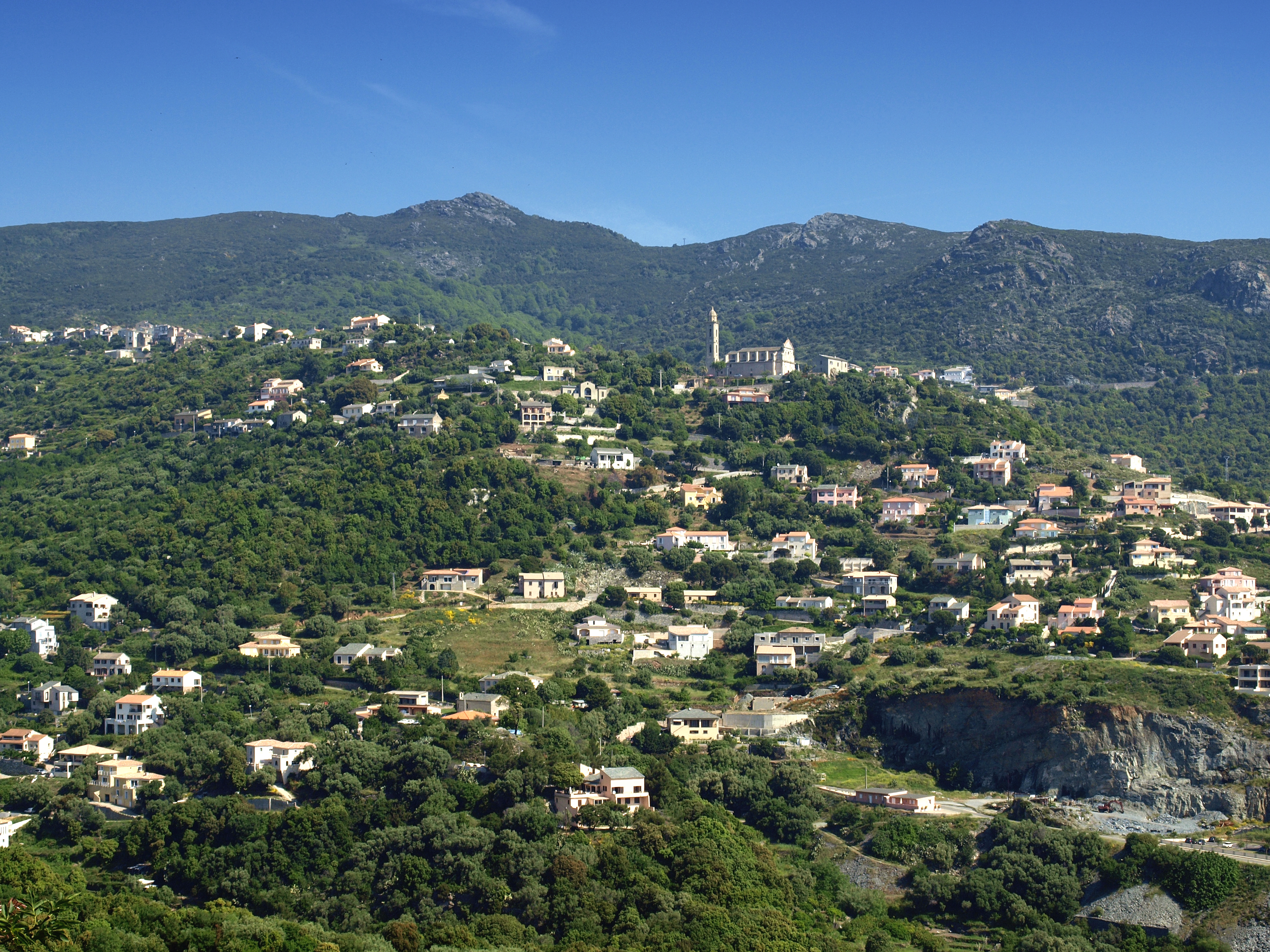 Ville-di-Pietrabugno (Corsica) - Vue du village